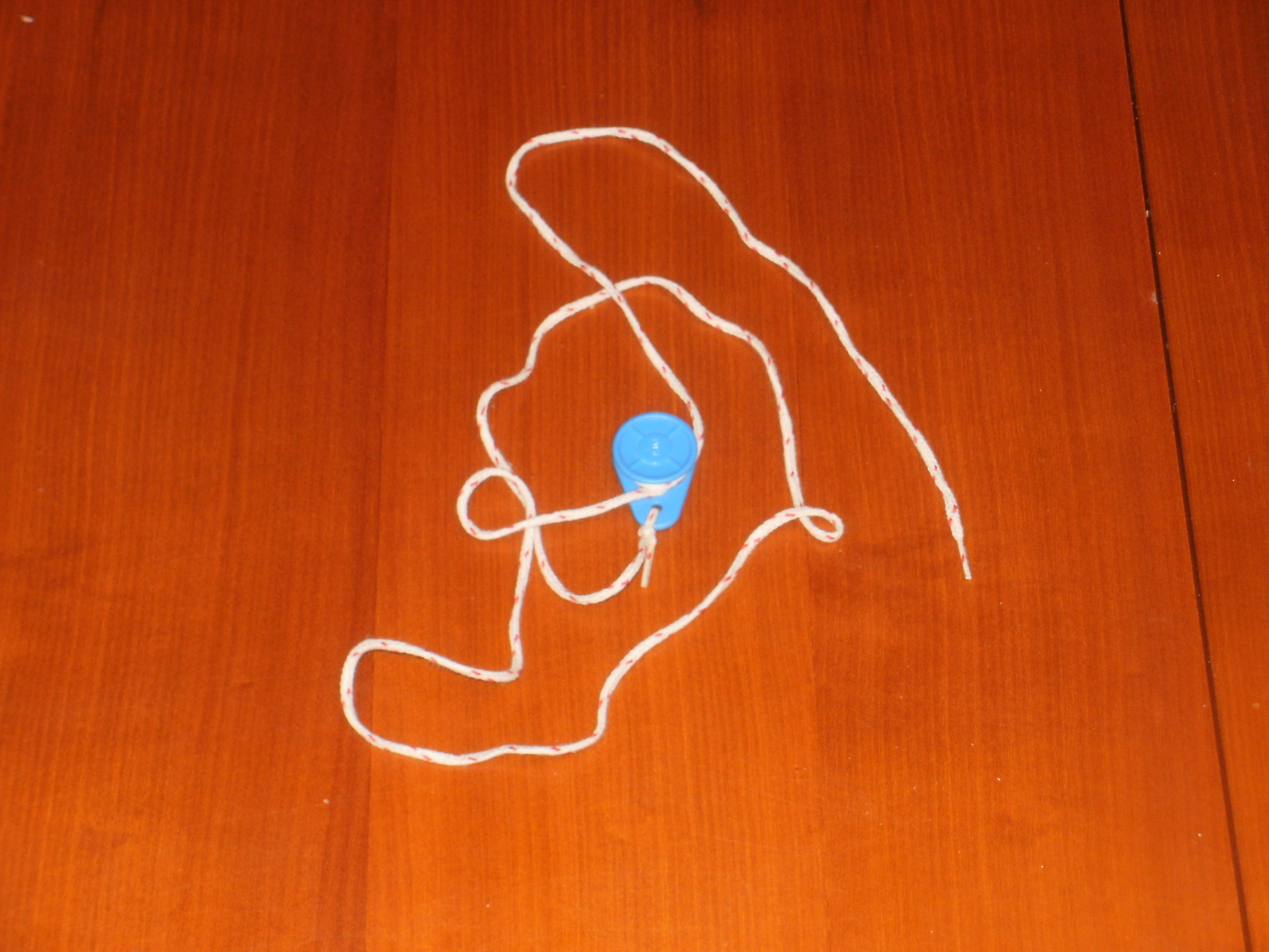 Eine Bundschließe zum Bündeln von Briefbunden durch den Briefzusteller